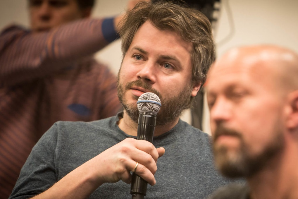 Minerva-redaktør Nils August Andresen